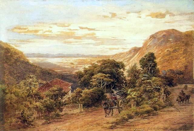 Bernhard Wiegandt, Floresta da Tijuca, 1875-1880